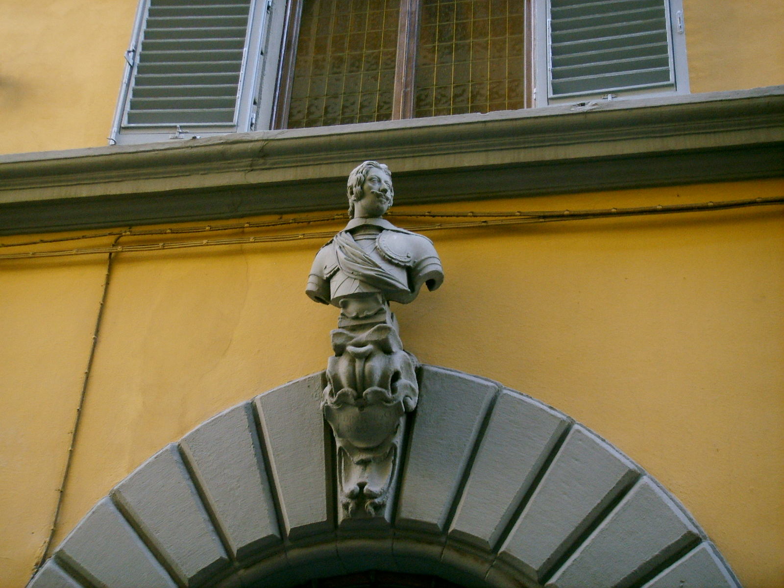 Via dell'alloro, busto ferdinando II